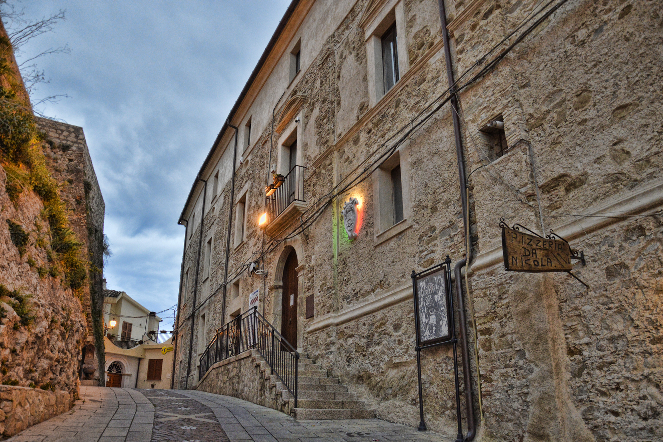 Palazzo Palopoli - municipio This is a photo of a monument which is part of cultural heritage of Italy.